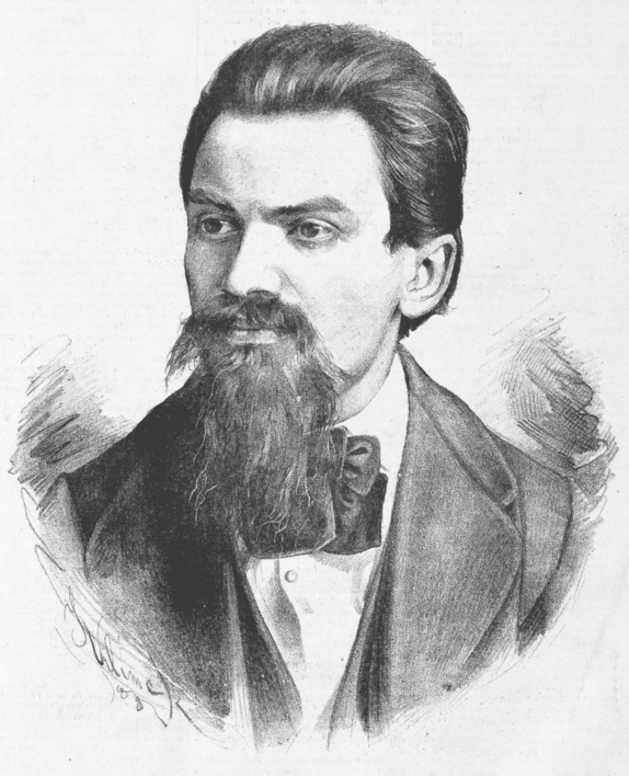 Jan Zacpal (1844-1888), redaktor Opavského týdeníku a český národní buditel na Opavsku